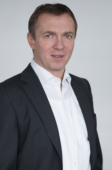 Vasil Bobela, portrét